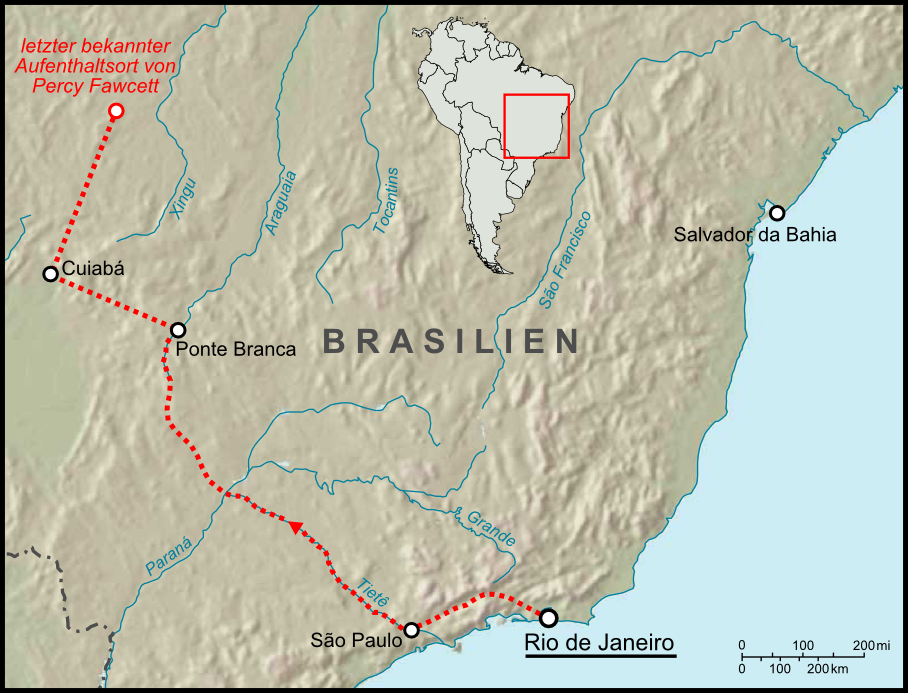 Route und Stationen der siebten Forschungsreise des Percy Fawcett